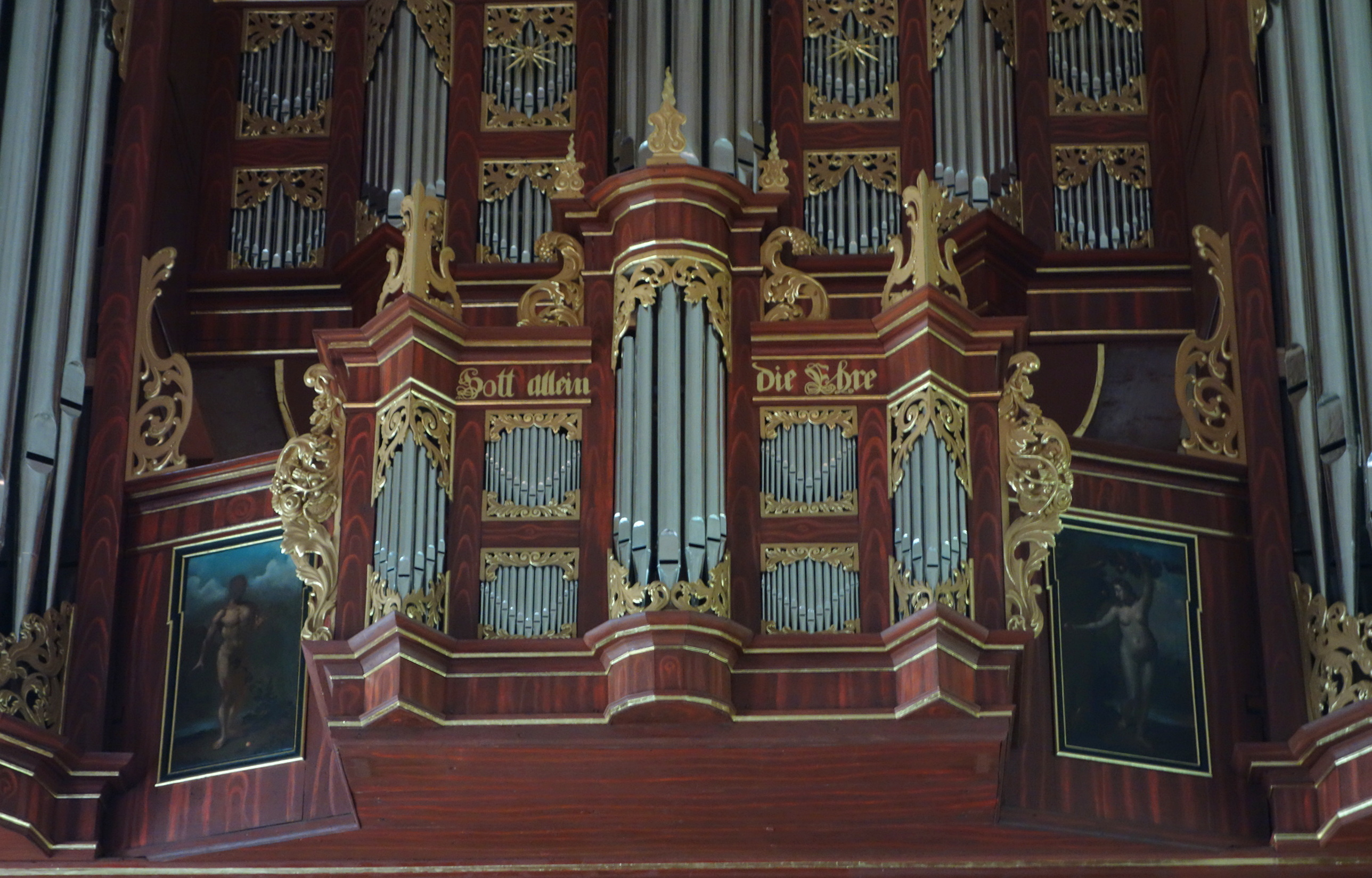 Orgel von St. Pankratius, Hamburg-Neuenfelde, Deutschland